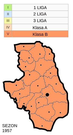 Jagiellonia w sezonie 1957 - mapa klubów